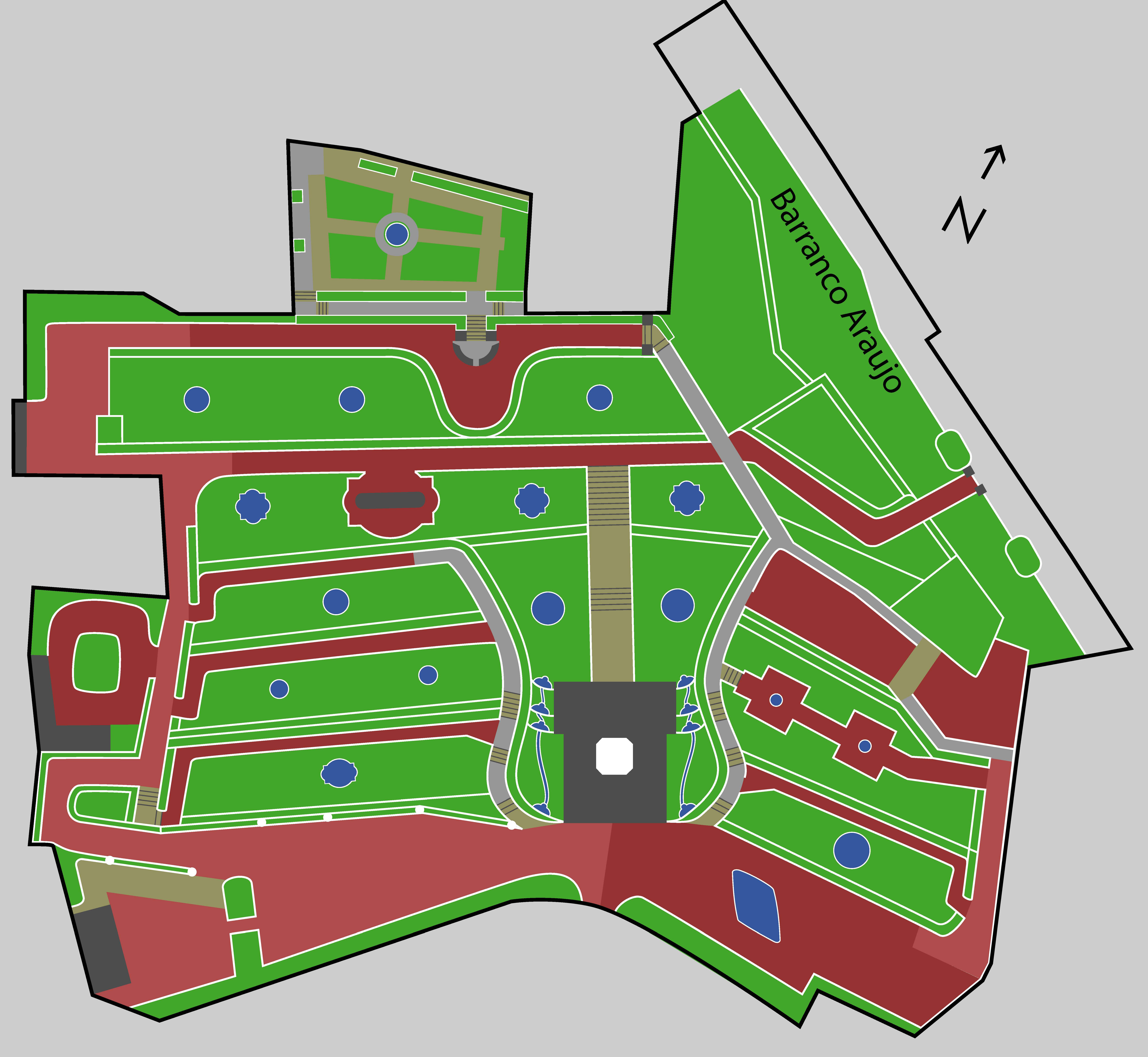 Grundriss des Parks Jardines del Marquesado de la Quinta Roja